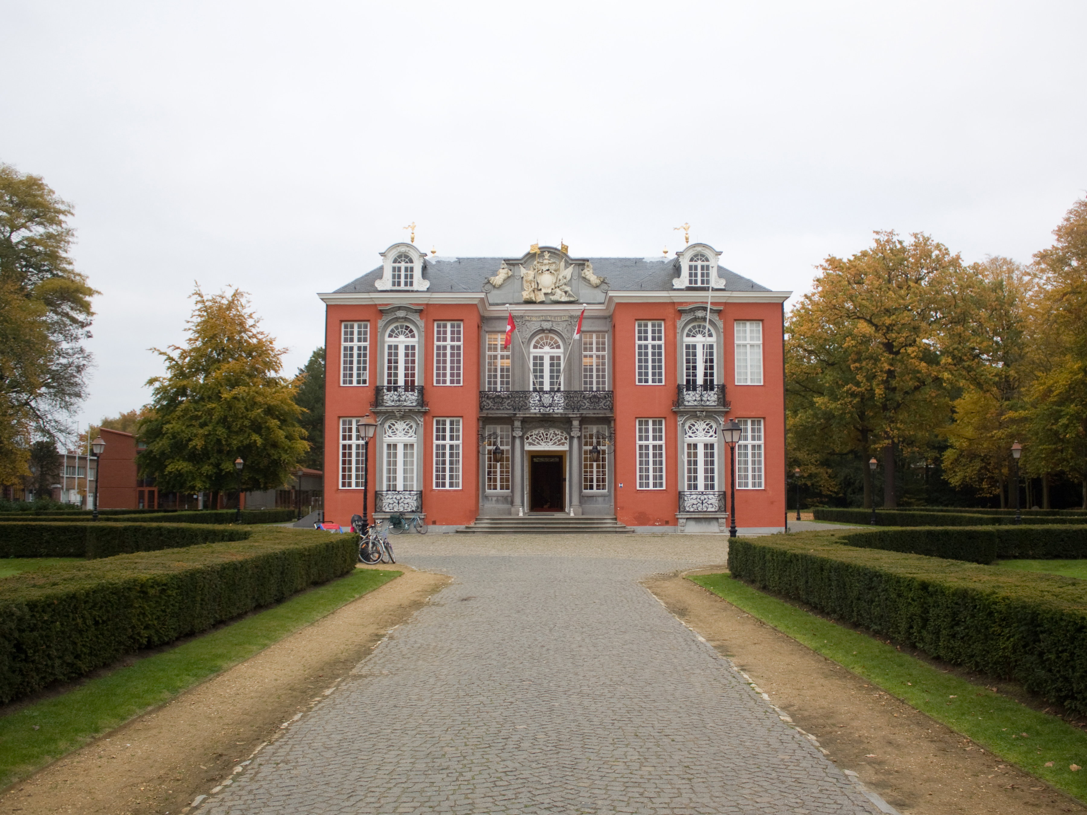 Kasteel Sorghvliedt te Hoboken